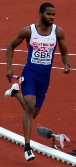 final race / finale